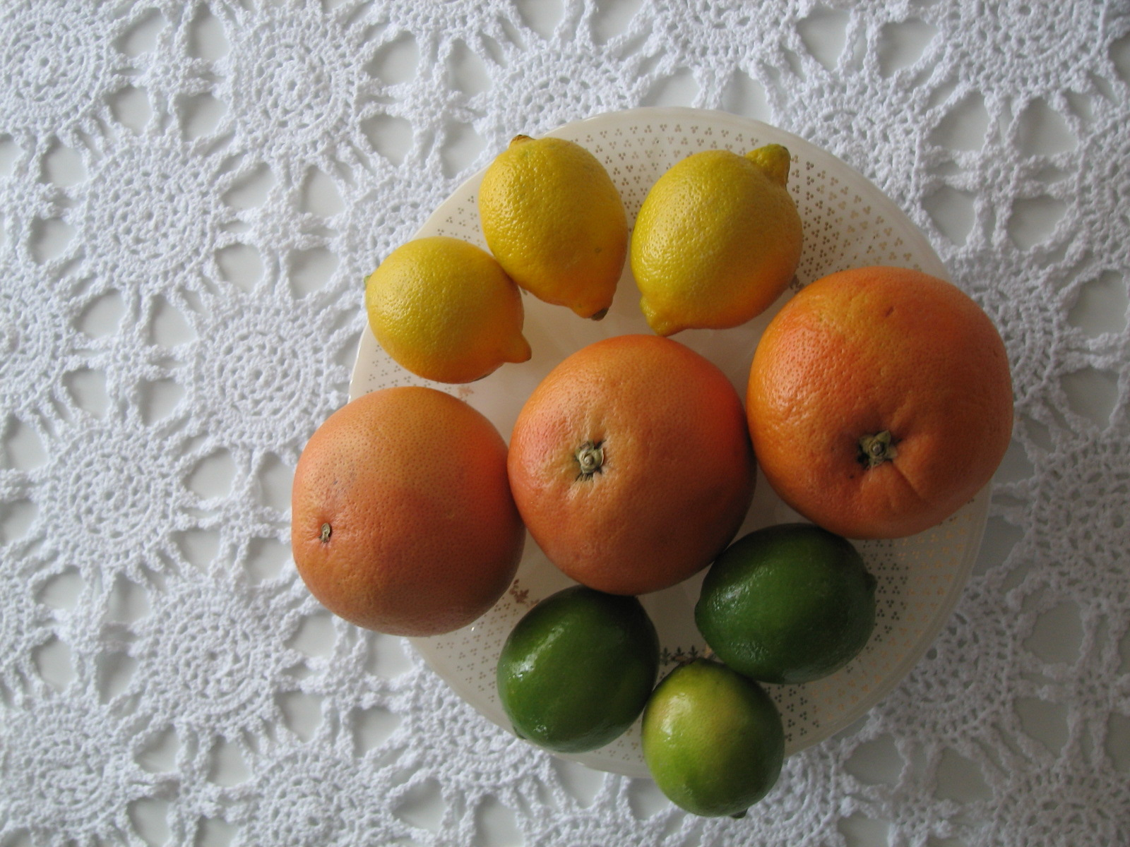 Various citrus fruits: lemons, oranges and limes.